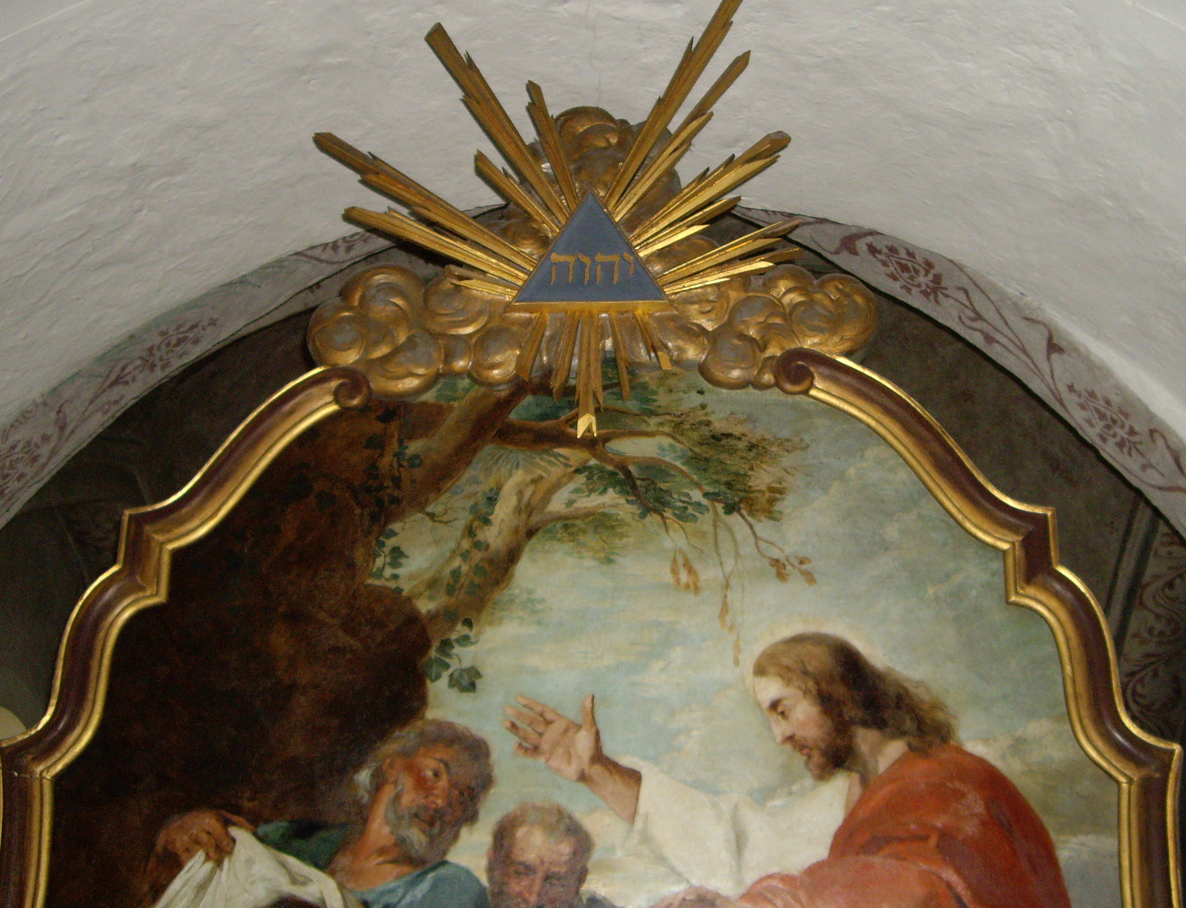 Altarkrön med Guds namn på hebreiska i Munka-Ljungby kyrka